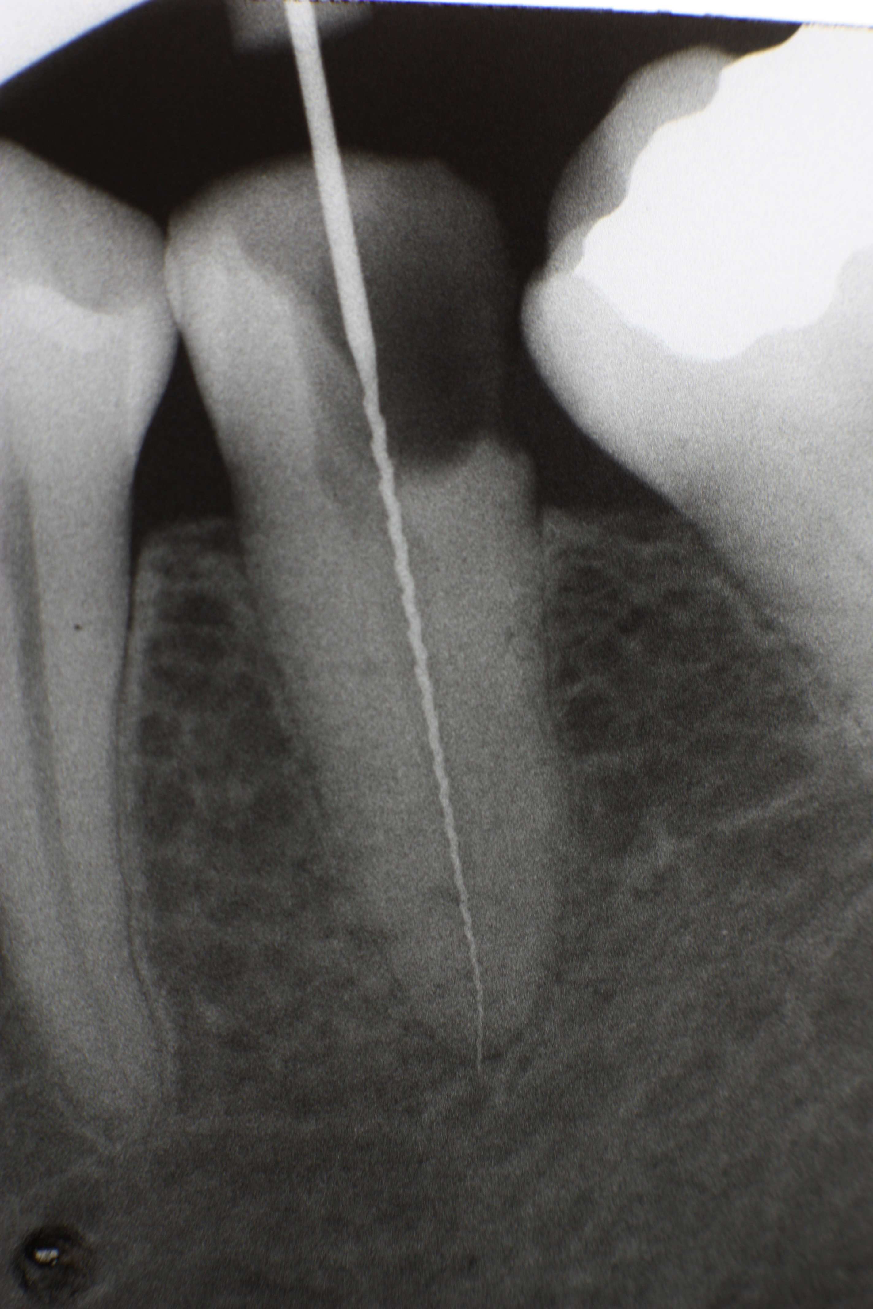 teeth; Messaufnahme Zahn 35